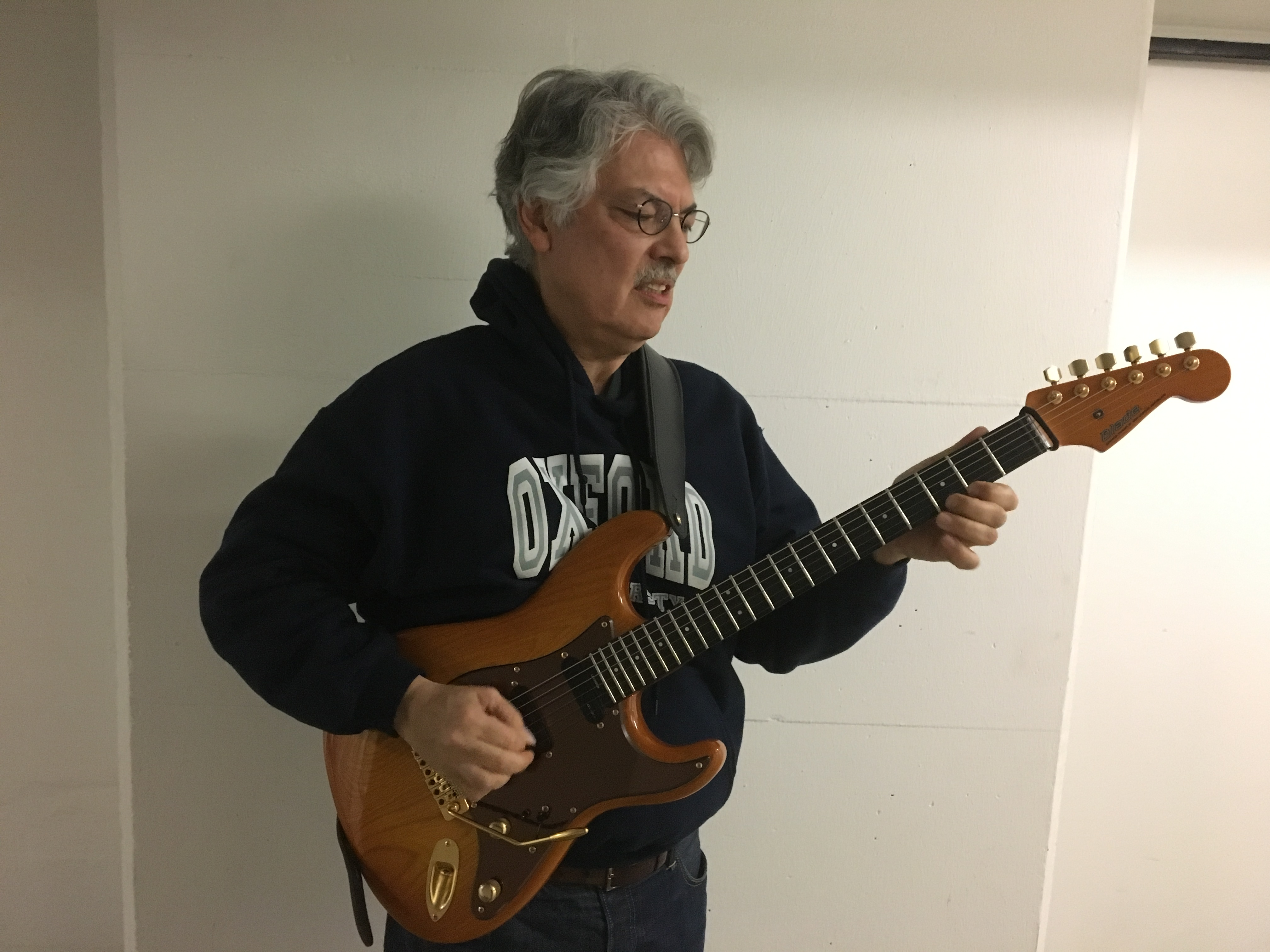 Jerry spielt Gitarre